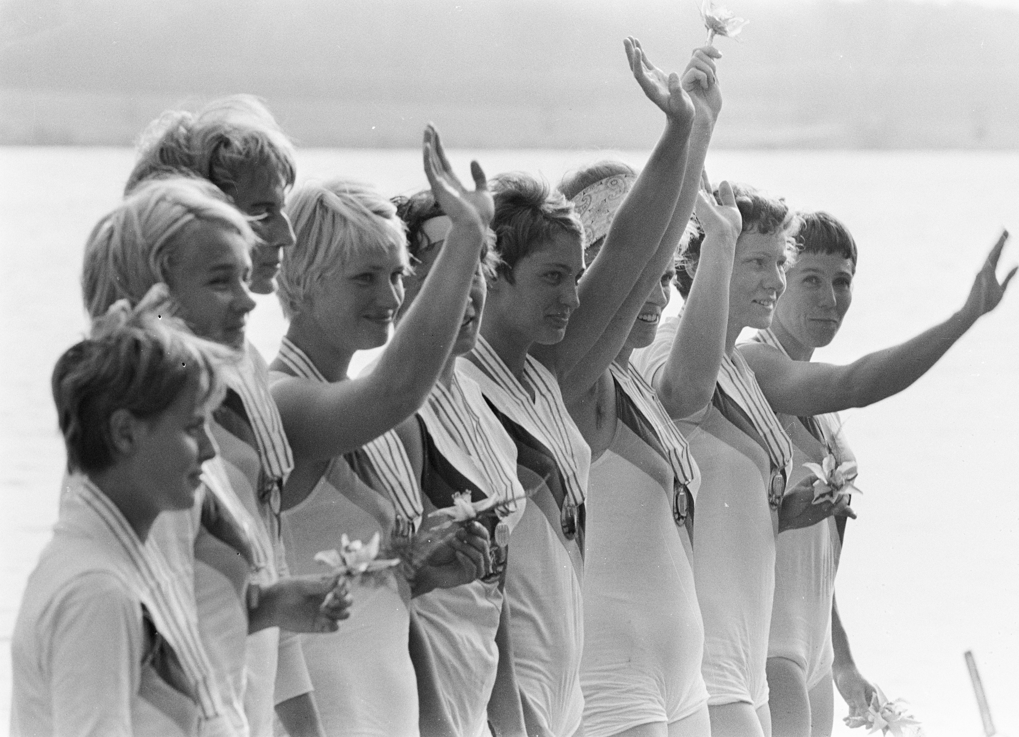 Europese Roeikampioenschappen dames 1966, Oost-Duitse acht. ID: v.l.n.r. Ursula Jurga-Bader, Marianne Mewes, Brigitte Butze-Rintisch, Ingrid Falk-Fischer, Irmgard Böhmer, Inge Mund, Hilde Amelang, Margarete Selling en Brigitte Amm